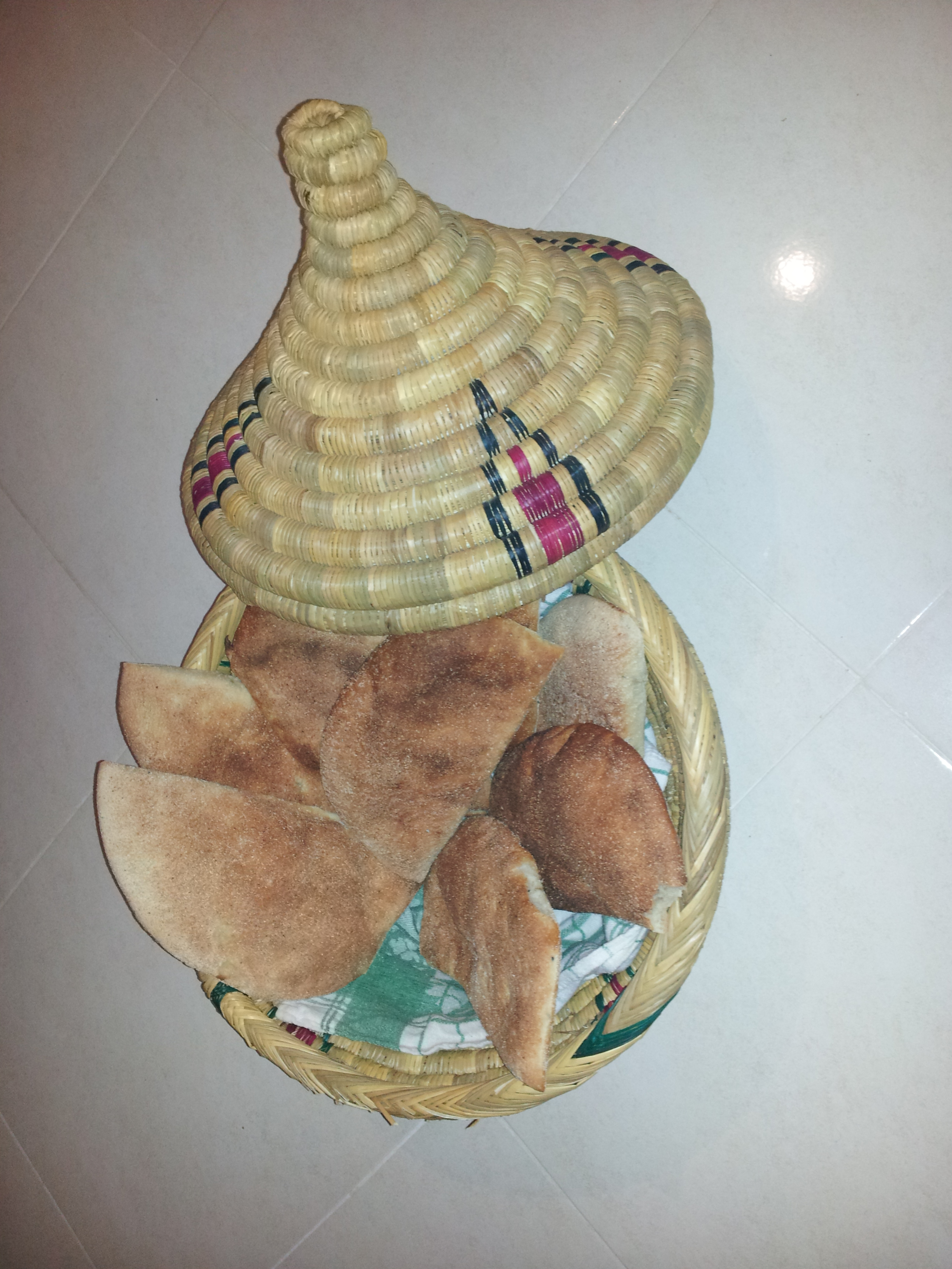 خبز في طبق